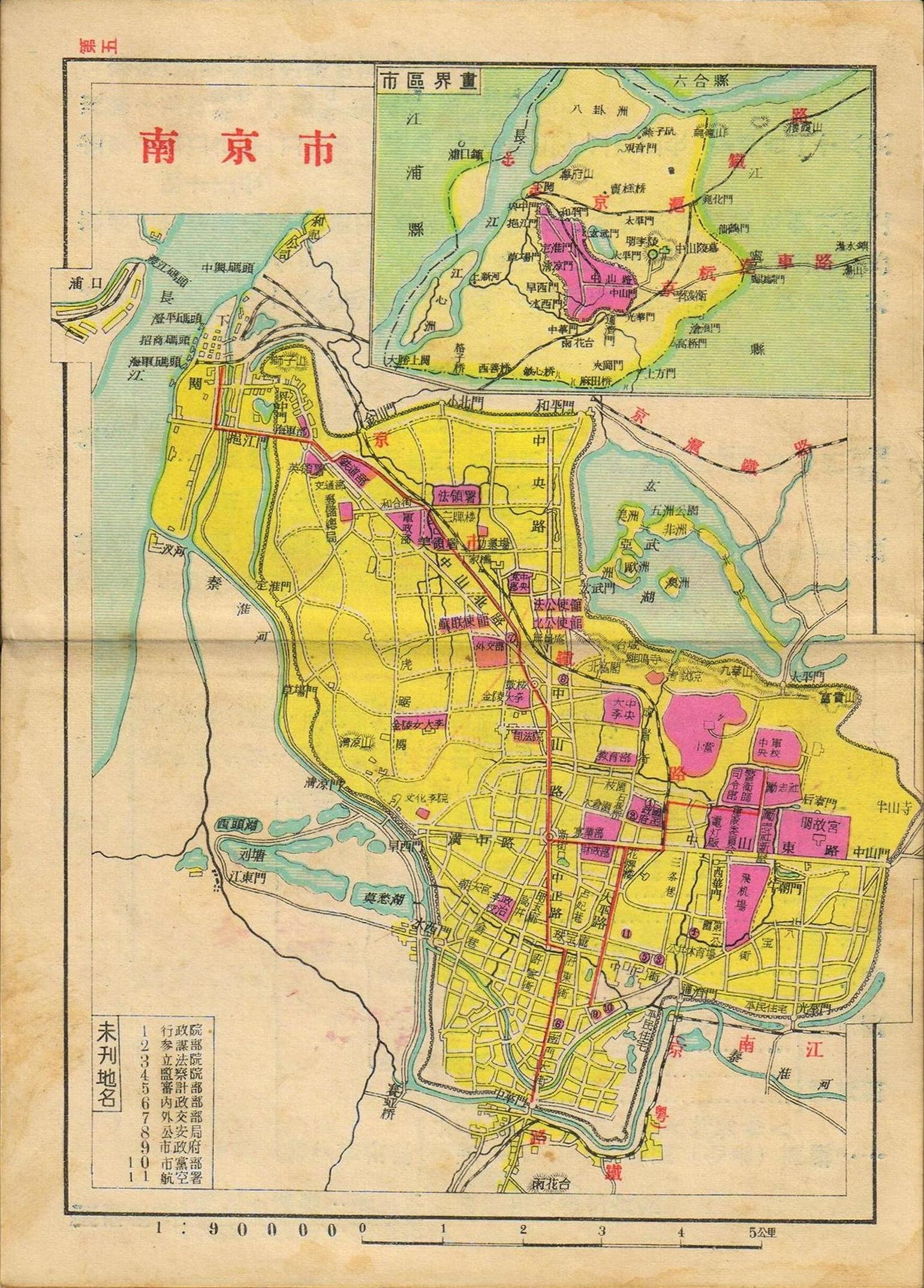 亚新地学社1936年《袖珍中华全图》南京市